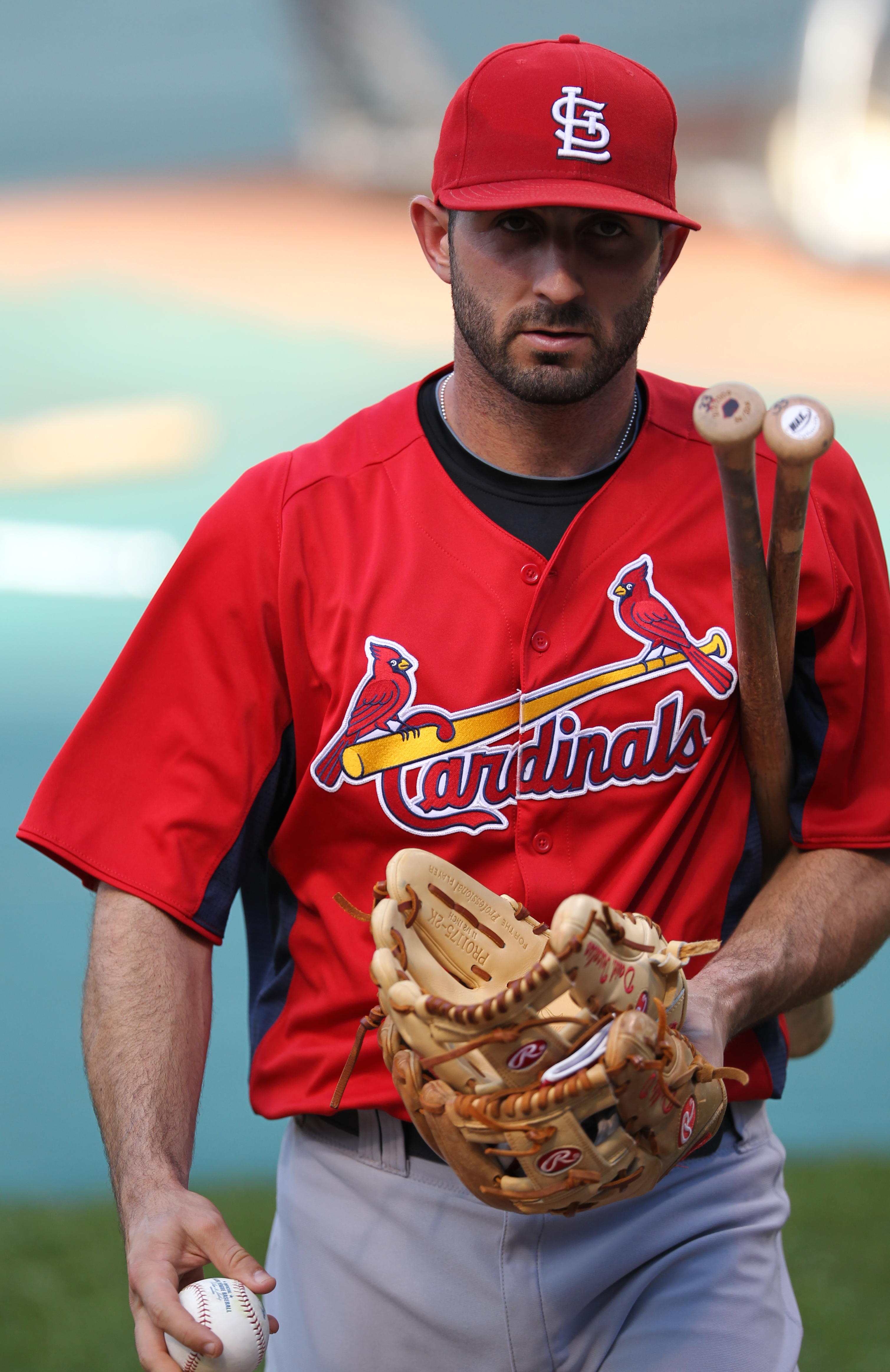 Daniel Descalso